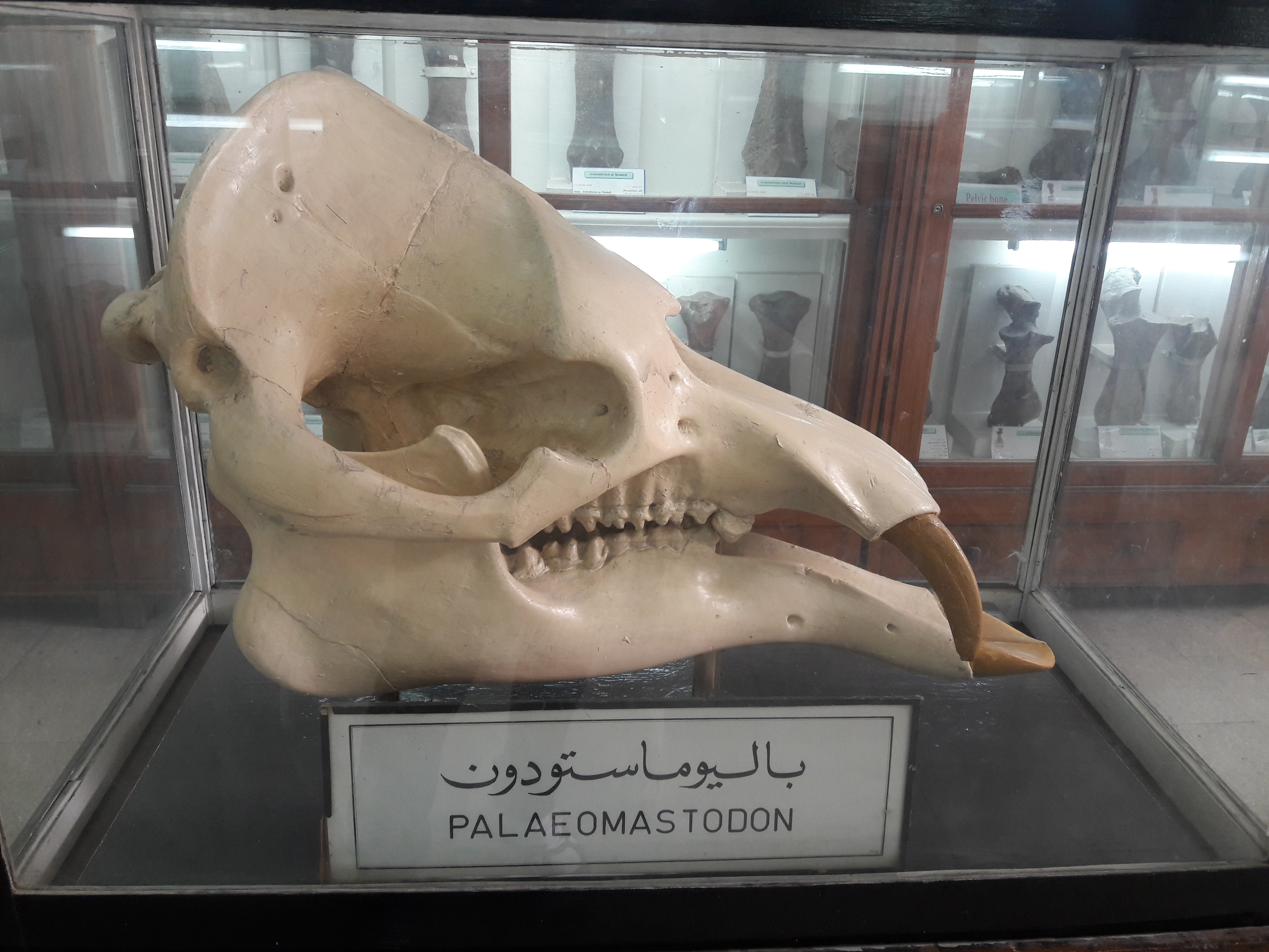 الباليوماستودون (باللاتينية: Palaeomastodon) هو جنس منقرض ينتمي إلى الفيليات